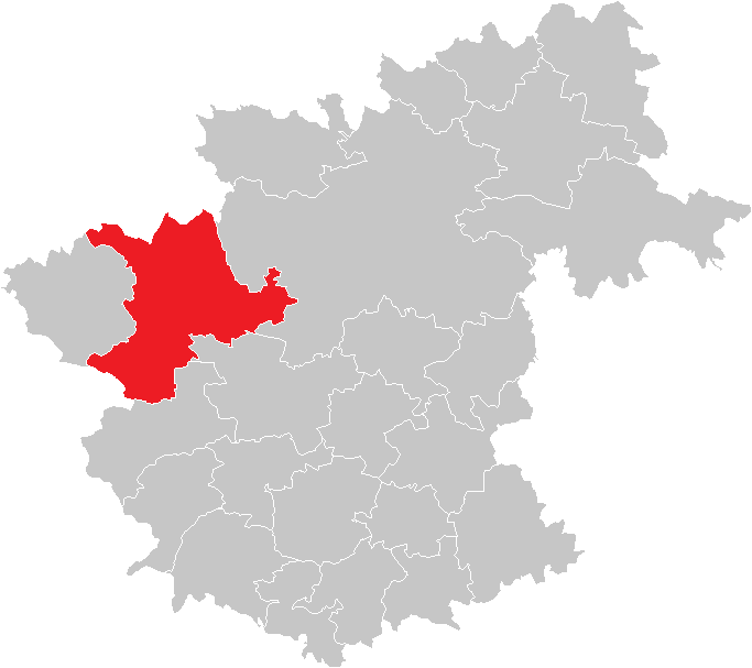 Bezirk Zwettl